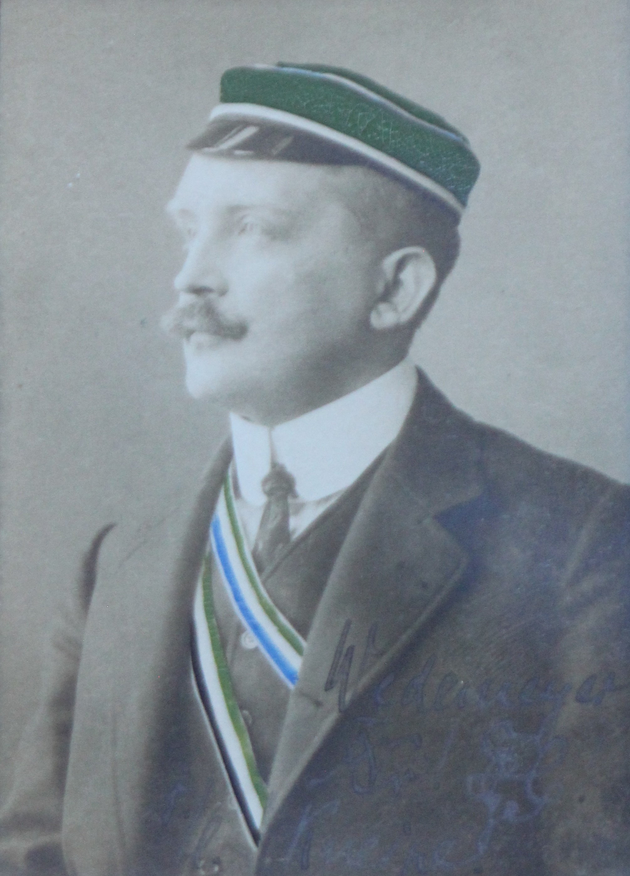 Porträtfotografie des späteren Rechtsgelehrten Werner Wedemeyer (1870–1934).